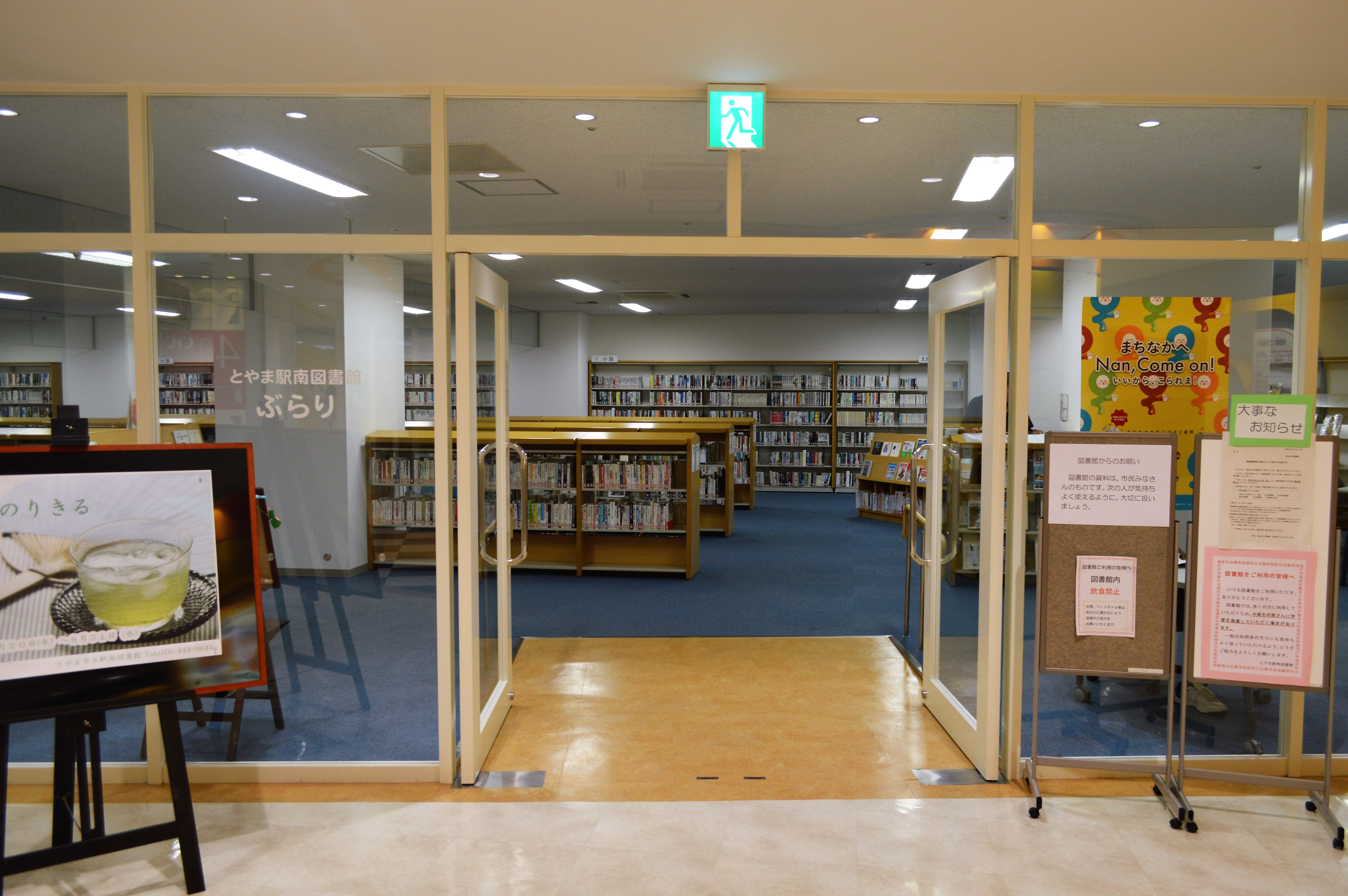 富山市立とやま駅南図書館。富山駅前のCiCビル4階。富山市立こども図書館を併設している。